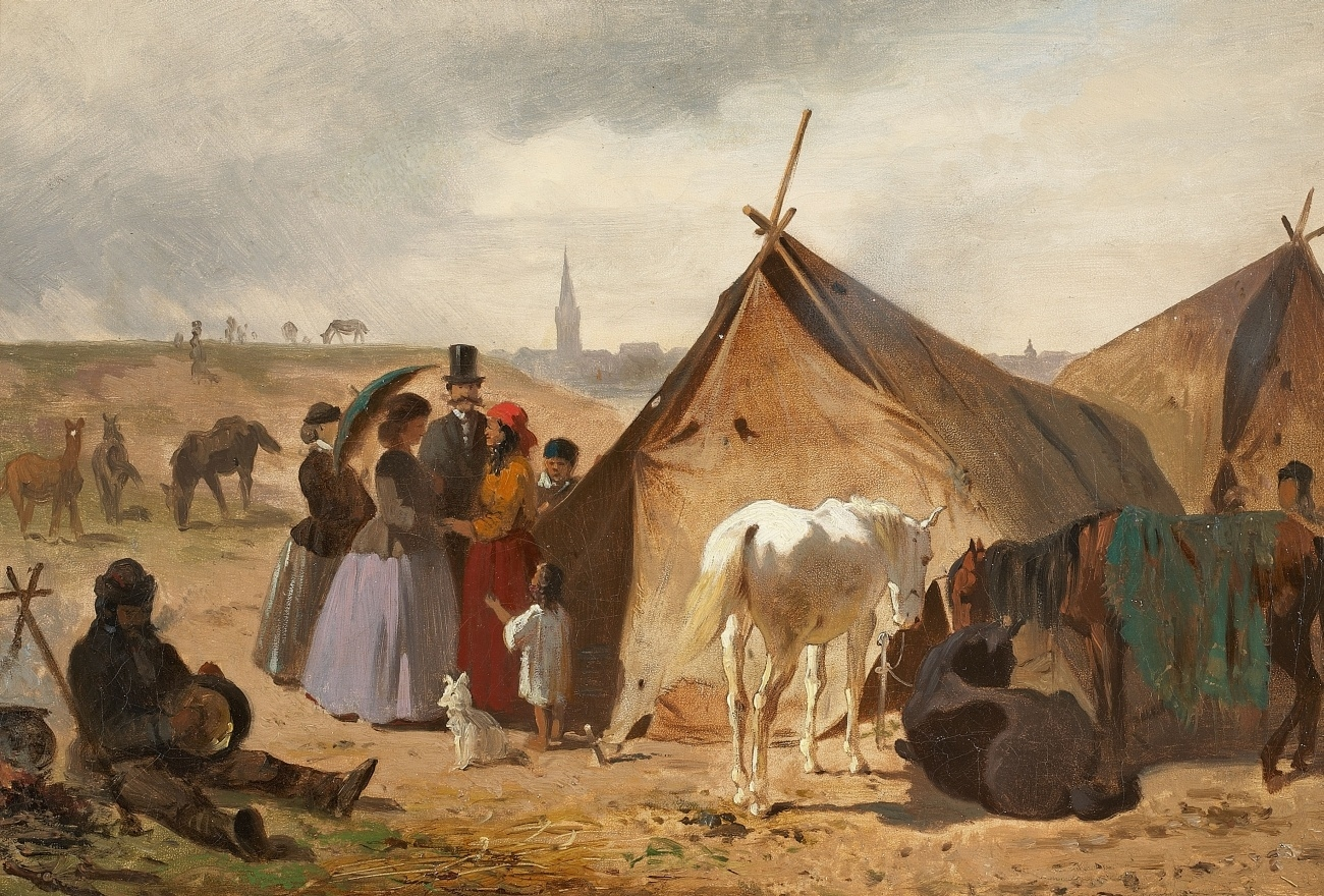 Zigeunerlager vor Düsseldorf. Öl auf Leinwand. 25,5 x 36,5 cm.